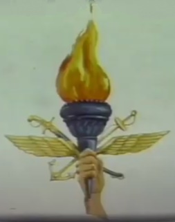 Logo de la Junta Militar de Gobierno de la República Argentina (1976-1983).